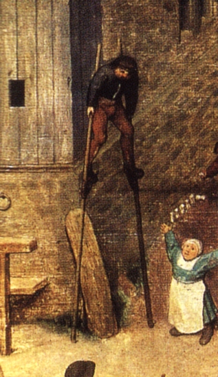 Ein Stelzenläufer. Ausschnitt aus Pieter Bruegels Gemälde Die Kinderspiele